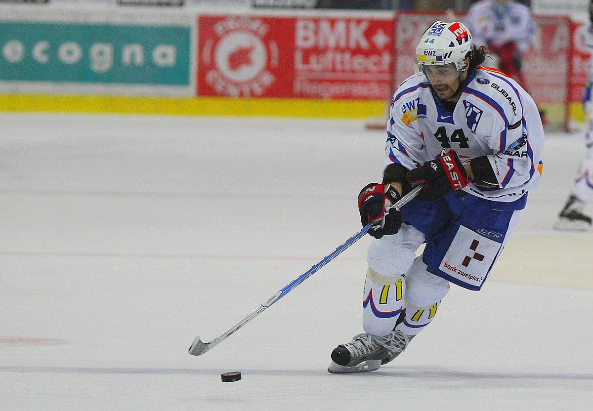 Andres Ambühl, sous le maillot des ZSC Lions, à la poursuite du palet